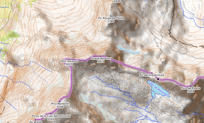 carte réalisée sur umap This map may be incomplete, and may contain errors. Don't rely solely on it for navigation.